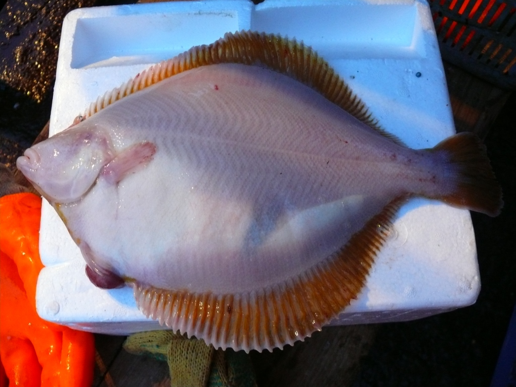 Желтопёрая камбала северных Курильских островов